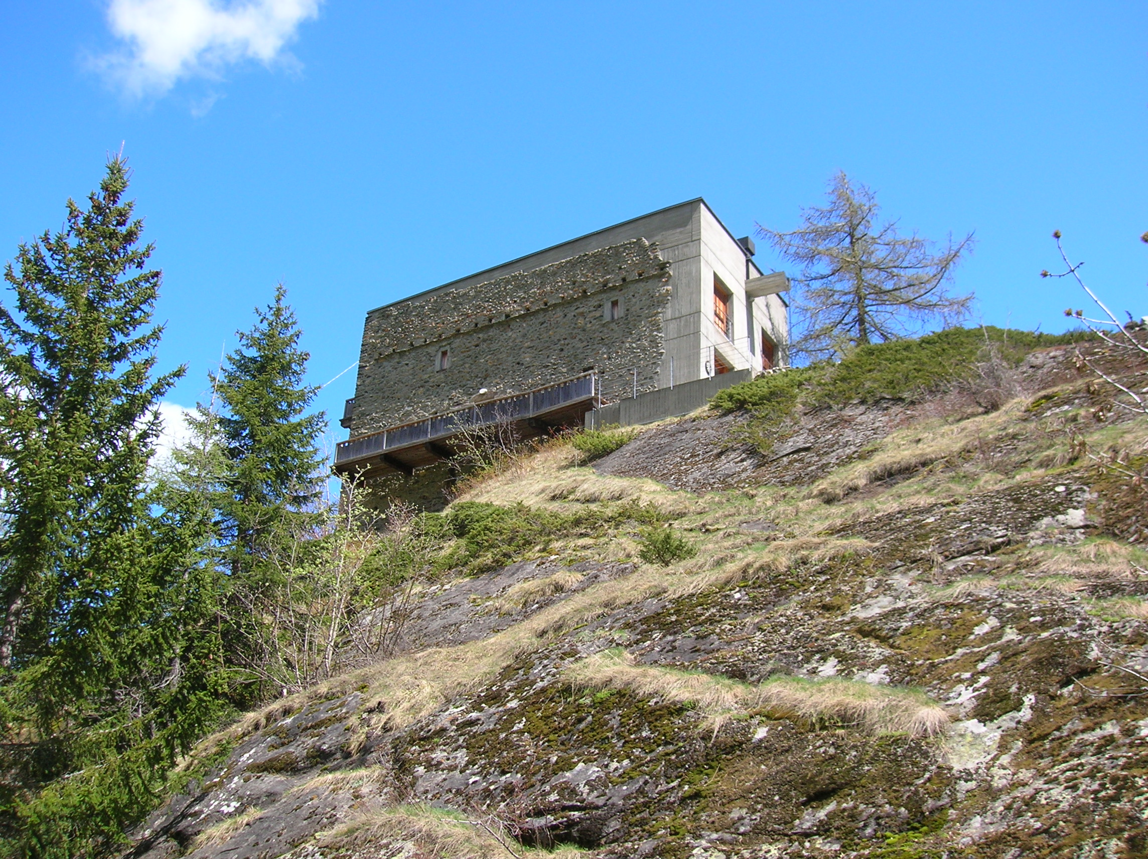 Casaforte di Planaval, Planaval, Arvier, Valle d'Aosta, Italia.